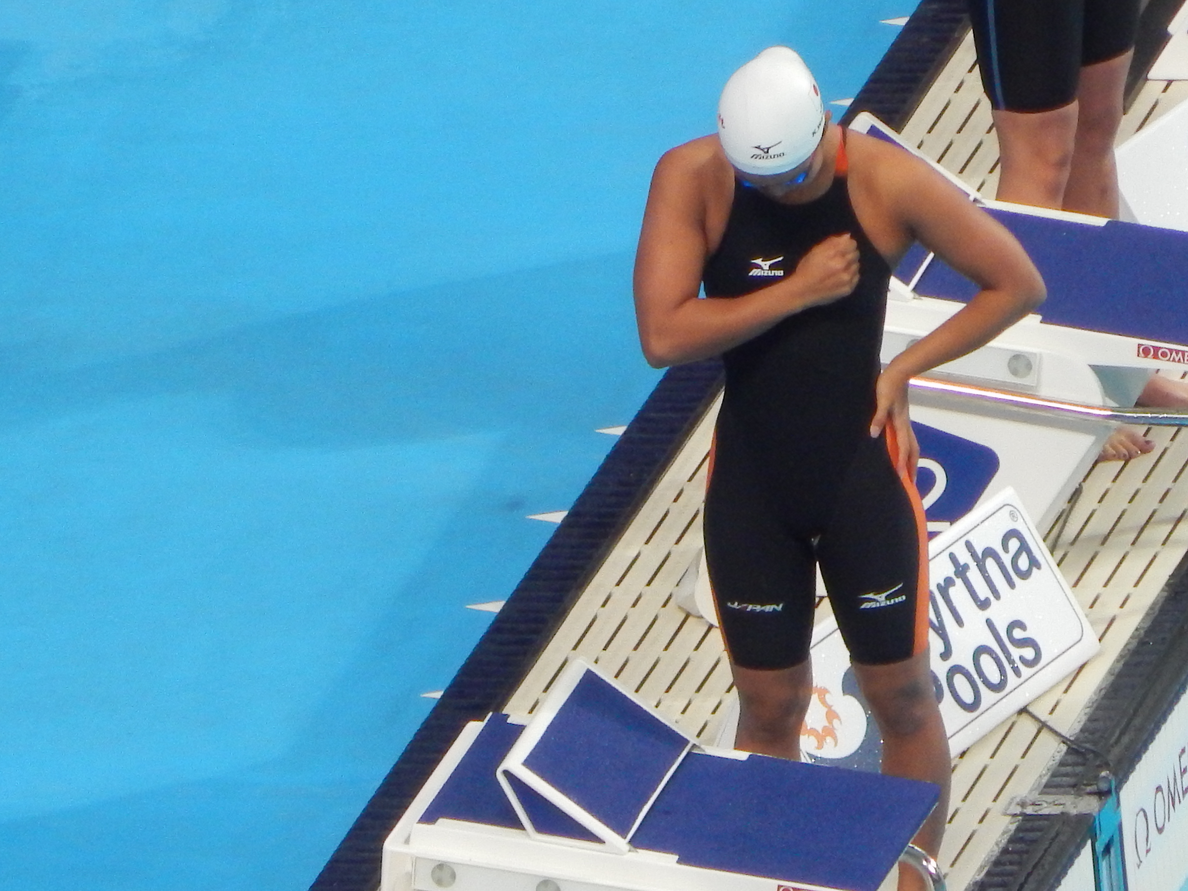 Канако Ватанабе на чемпионате мира в Казани